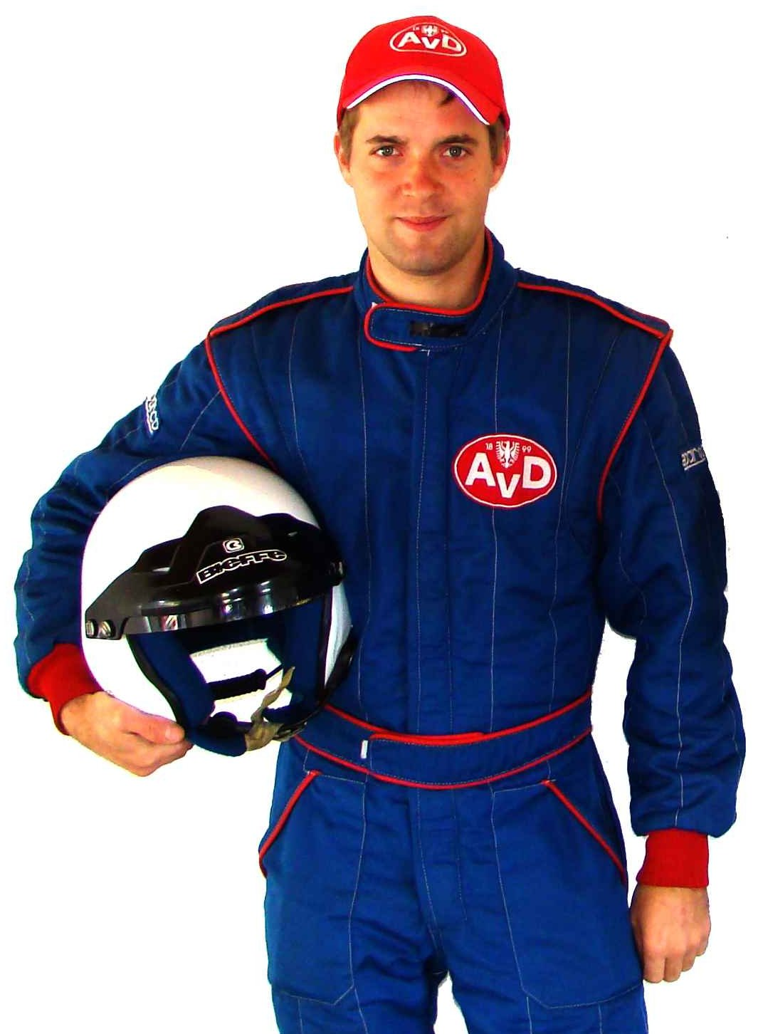 Portraitbild von Thomas Robel beim Shooting am 14.10.2008 in Laubusch.